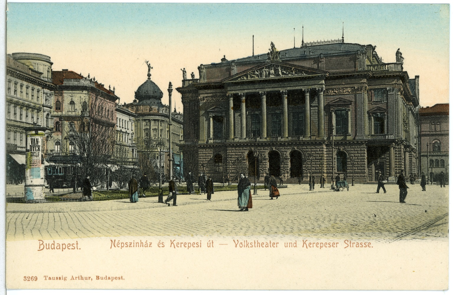 Budapest; Volkstheater und Kerepeser Straße This postcard is from publisher Brück & Sohn in Meißen ( postcard has a unique number 03269 and is available in a higher resolution at the publisher. This images was uploaded in a cooperation project between Wikipedians and the publisher.